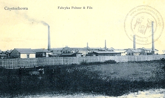 Tuchfabrik "Peltzer & Fils" in Tschenstochau, Postkarte aus der Sammlung Sitek um 1906